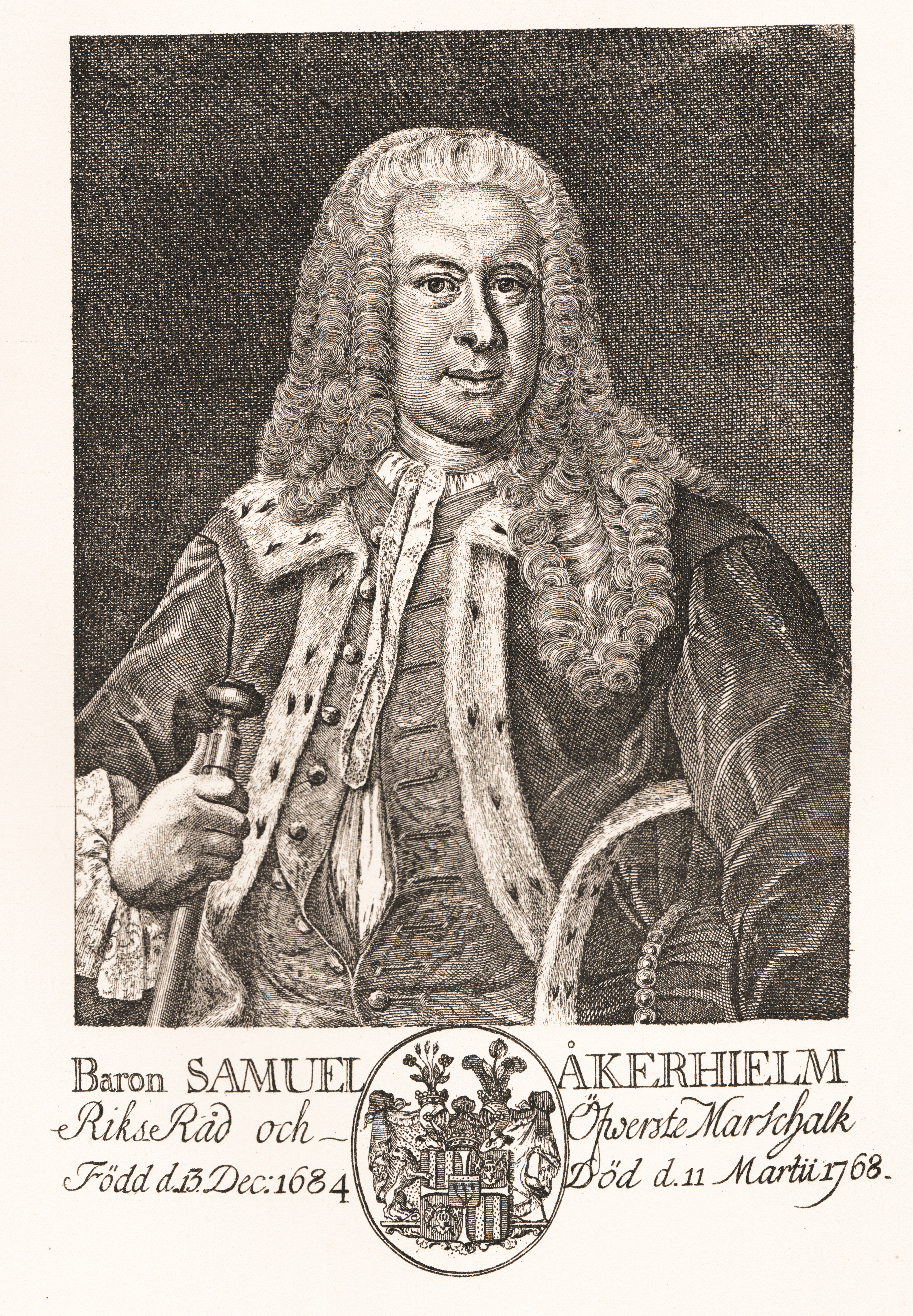 Samuel Åkerhielm den yngre (1684-1768).